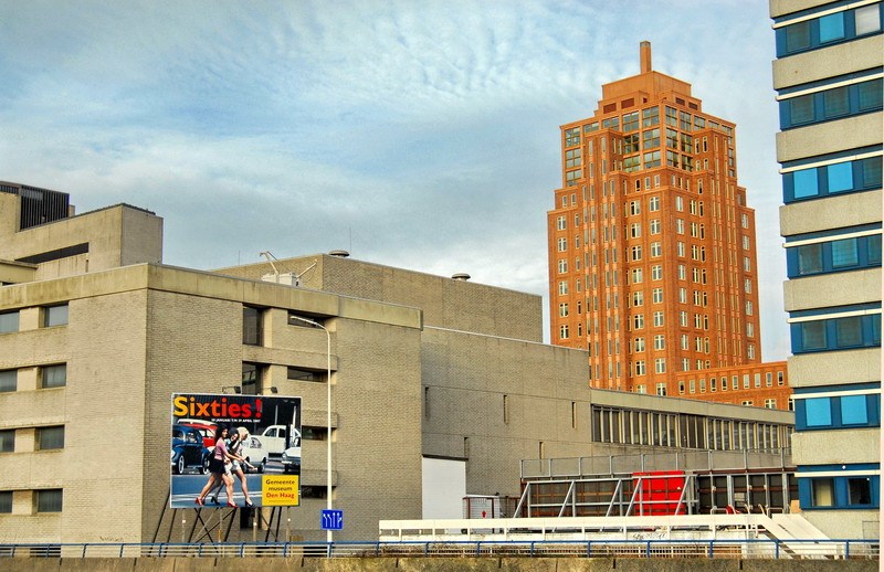 Achter het Koninklijk Conservatorium staat het 'CentreCourt' waarin o.a. de Voedsel en Waren Autoriteit (onderdeel van het Ministerie van Landbouw Natuur en Voedselkwaliteit) en de Sdu zijn gevestigd. Het gebouw is gelegen op de hoek van de Juliana van Stolberglaan en Prinses Beatrixlaan en werd opgeleverd in 2003.